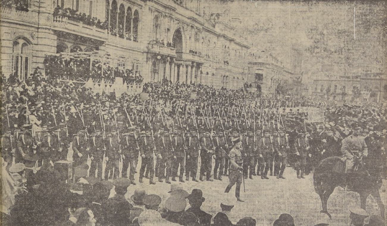 Cadetes chilenos desfilan en Buenos Aires después de La "Tragedia de Alpatacal"​ , accidente ferroviario ocurrido el 7 de julio de 1927